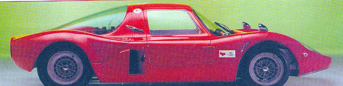 Bandini sport coupè 1000 "saloncino"